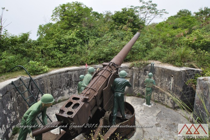 Fort de Canon sur l'ile de Cat Ba